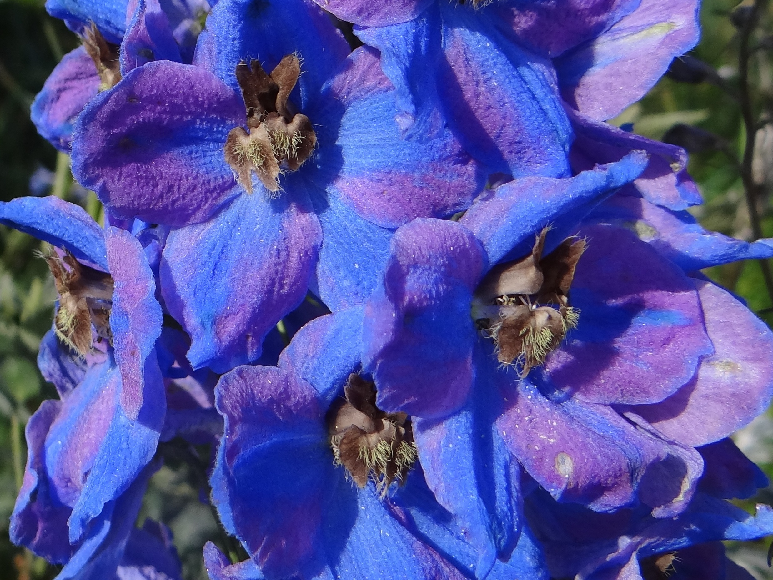 Delphinium elatum (cultivar)